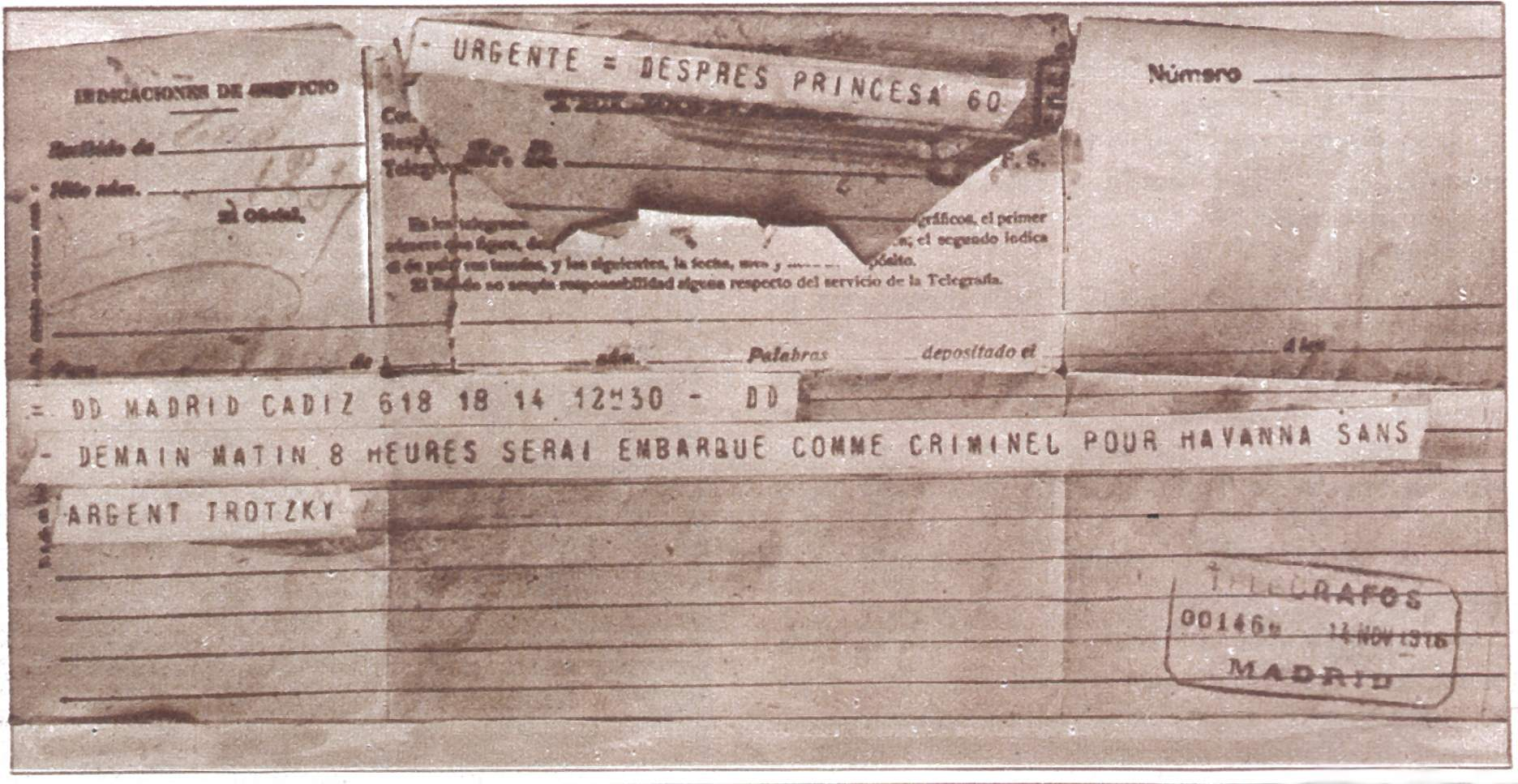 Telegrama enviado por L. Trotsky pidiendo ayuda pues va a ser expulsado de España.